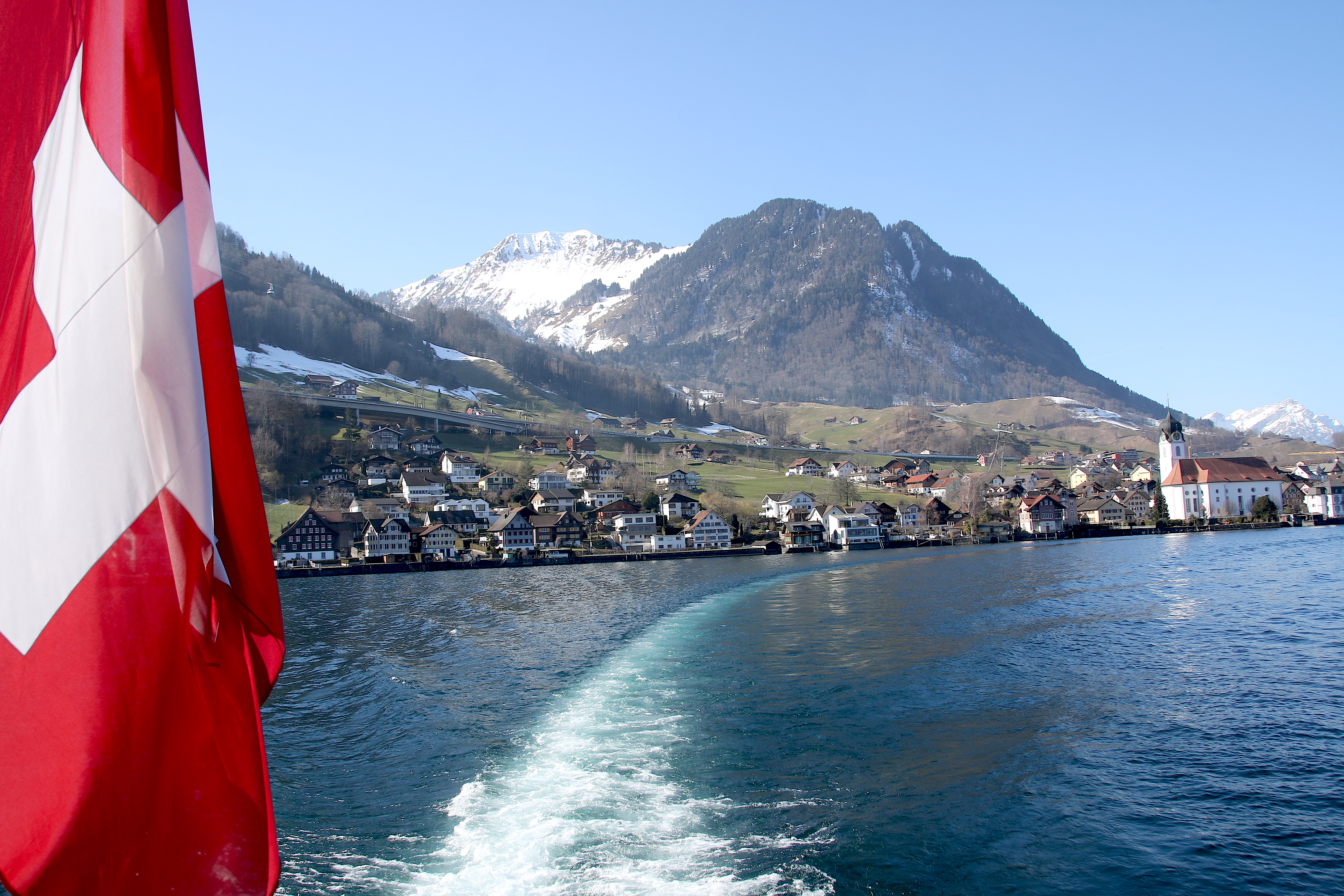 Beckenried mit Buochserhorn (2019)